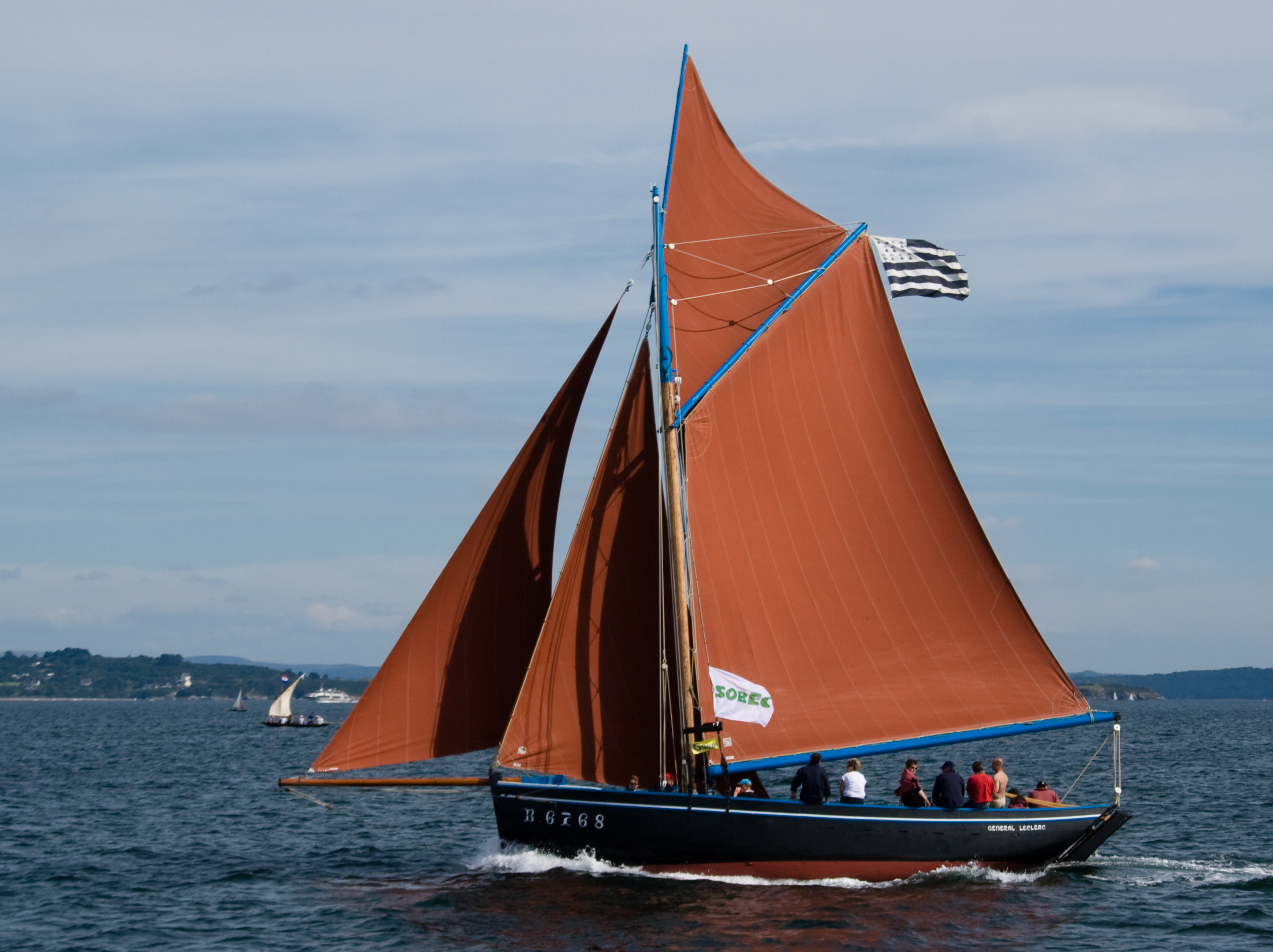 Général Leclerc, coquillier, Brest 2008